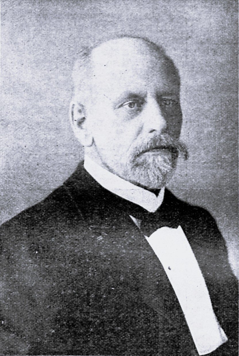 Max Jenne, erster stellvertretender Wortführer der Bürgerschaft.